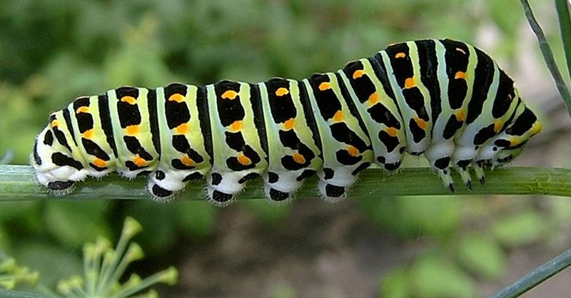 Raupe des Schwalbenschwanz